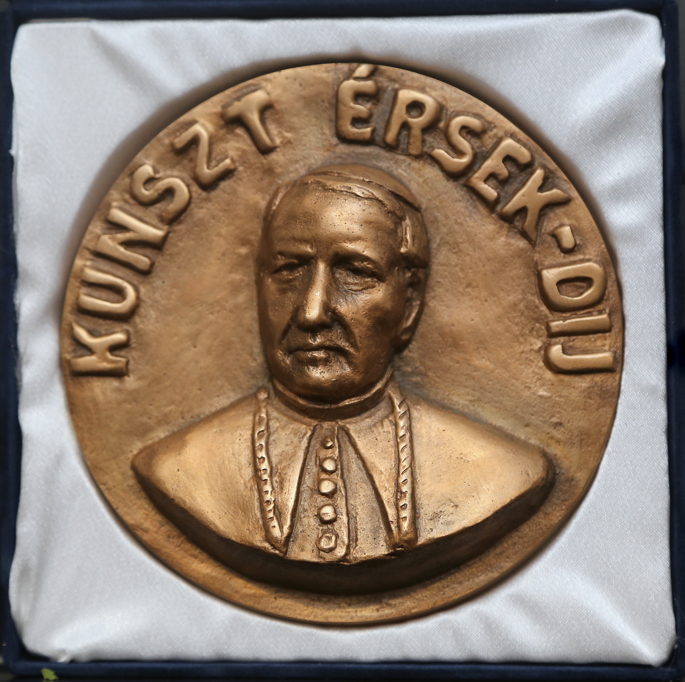 Kunszt érsek-díj, 2001-ben alapították